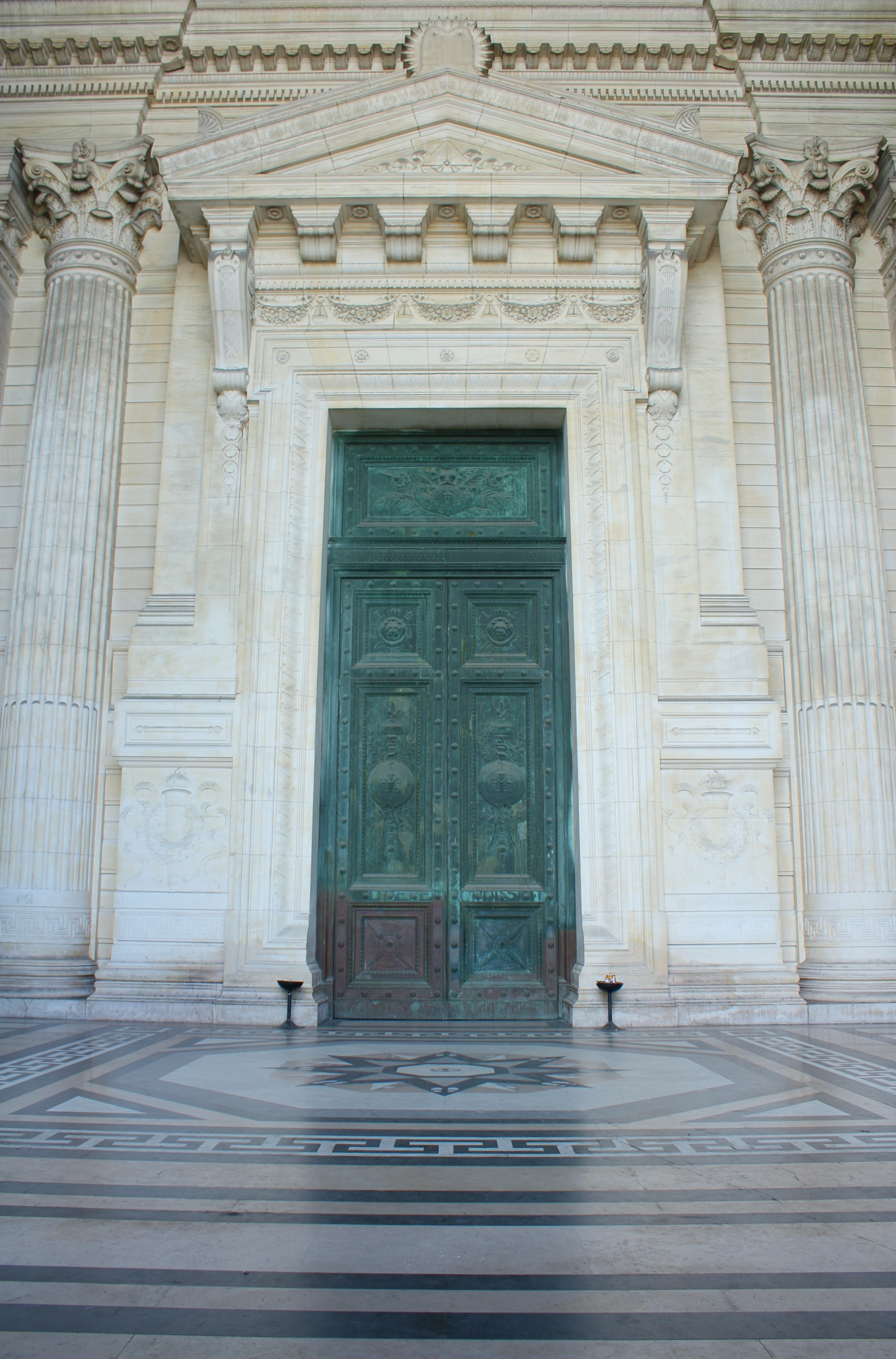 Porte d'entrée principale du Palais de justice de Bruxelles. Monument classé n°2043-0077/0